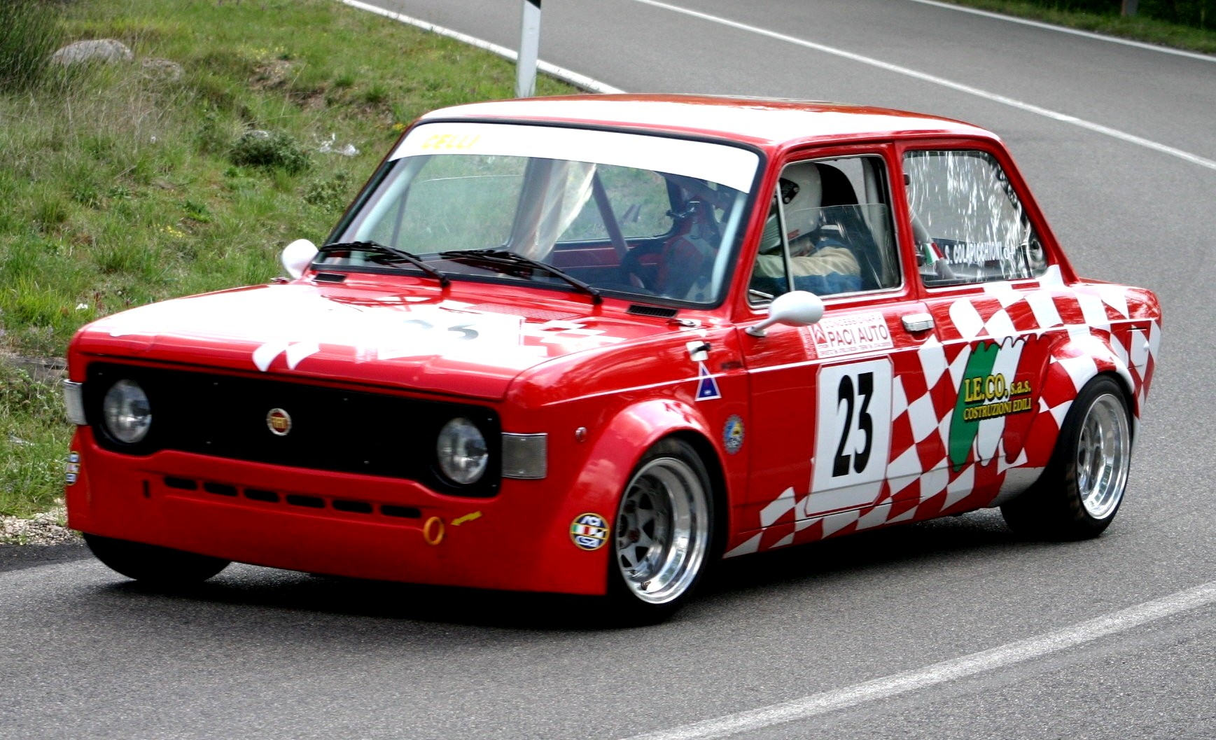 Una Fiat 128 Rally da competizione durante la cronoscalata della Castellana (Orvieto).